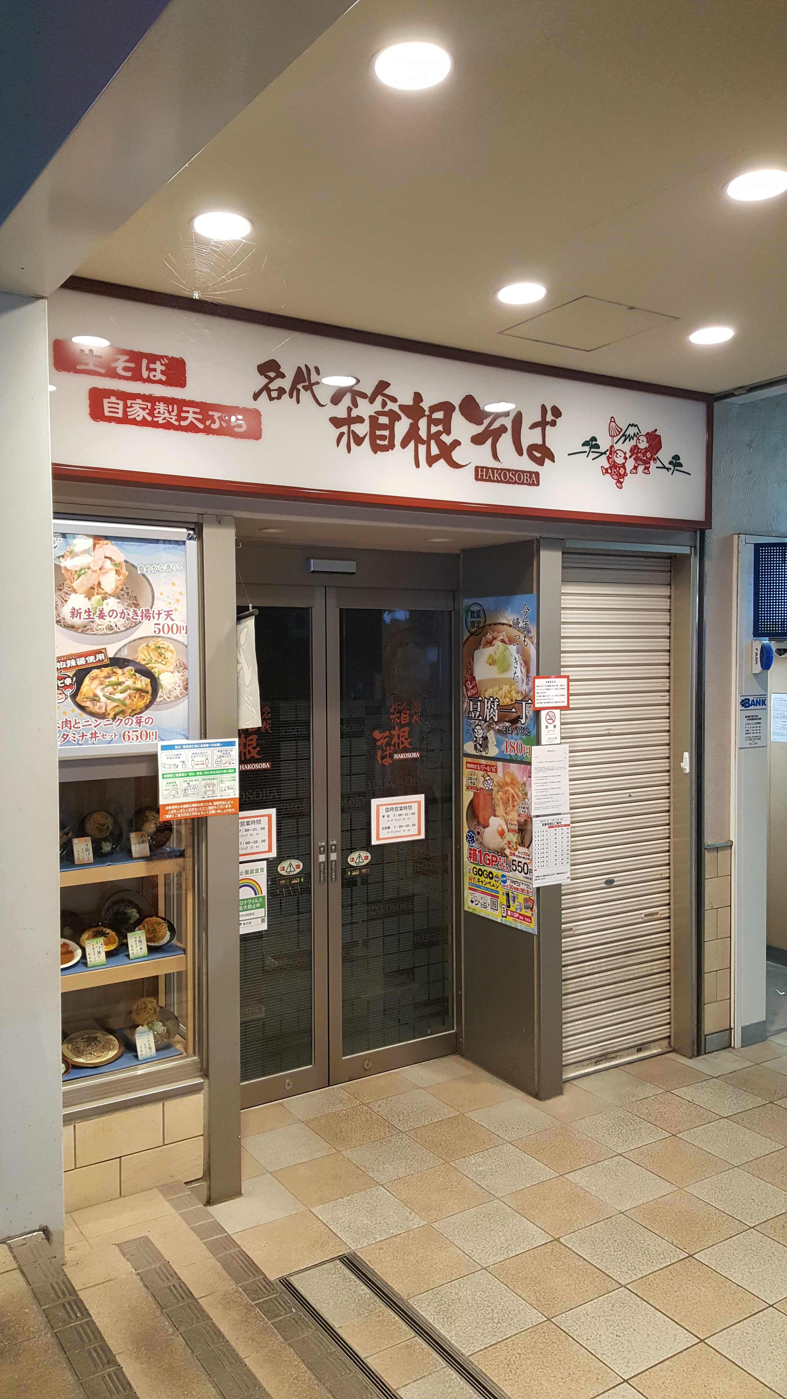 名代箱根そば・経堂店（2020年8月）